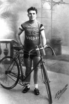 Frans Bonduel - Baasrode - Dendermonde - Oost-Vlaanderen - Vlaanderen - België